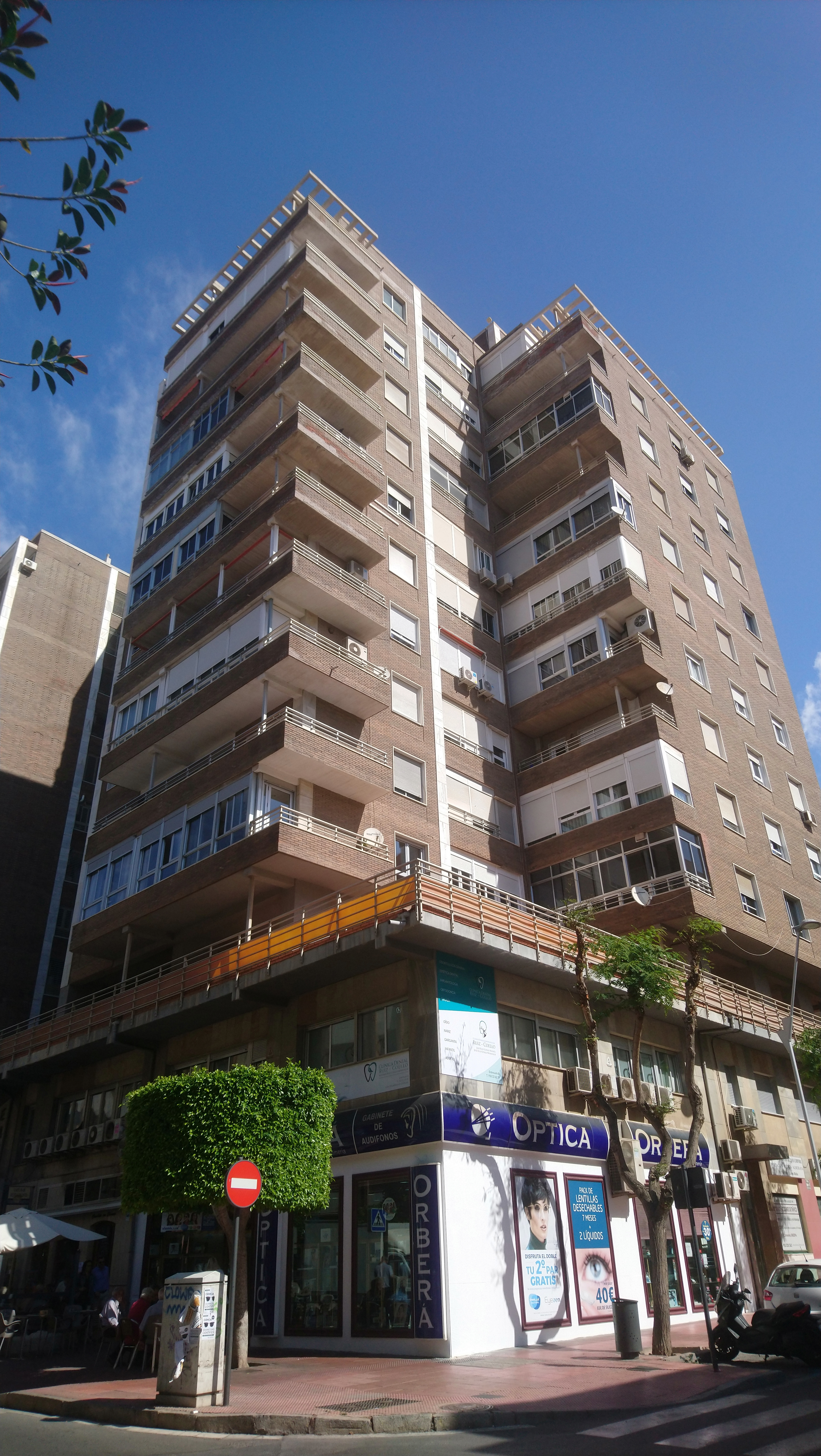 Edificio Torres Bermejas en Almería